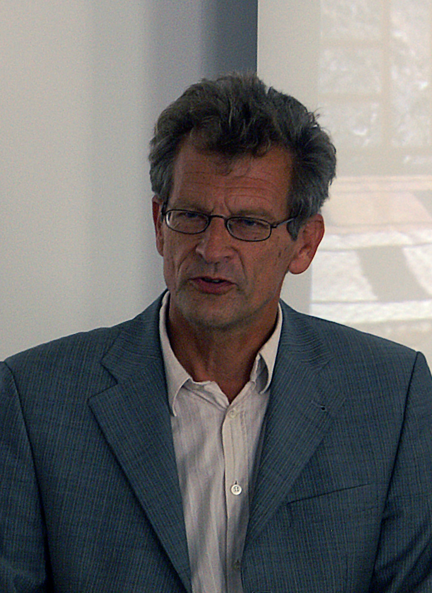 Prof. Bernhard Uehleke auf dem Symposium "(Zukunfts-)Perspektiven der Phytotherapie" am 1. Oktober 2014 im Kloster Oberzell bei Würzburg.